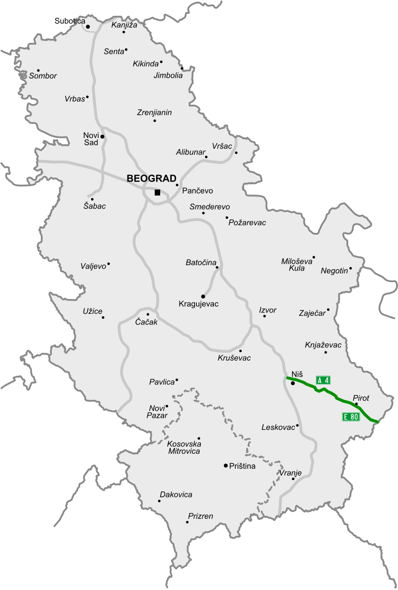 Coridor X_est_november 2019